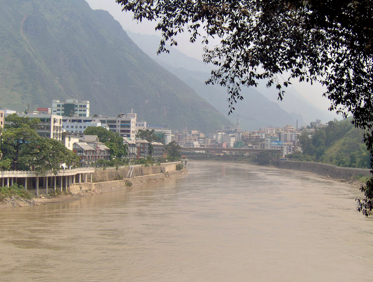 Ville de Liuku, Yunnan, Chine